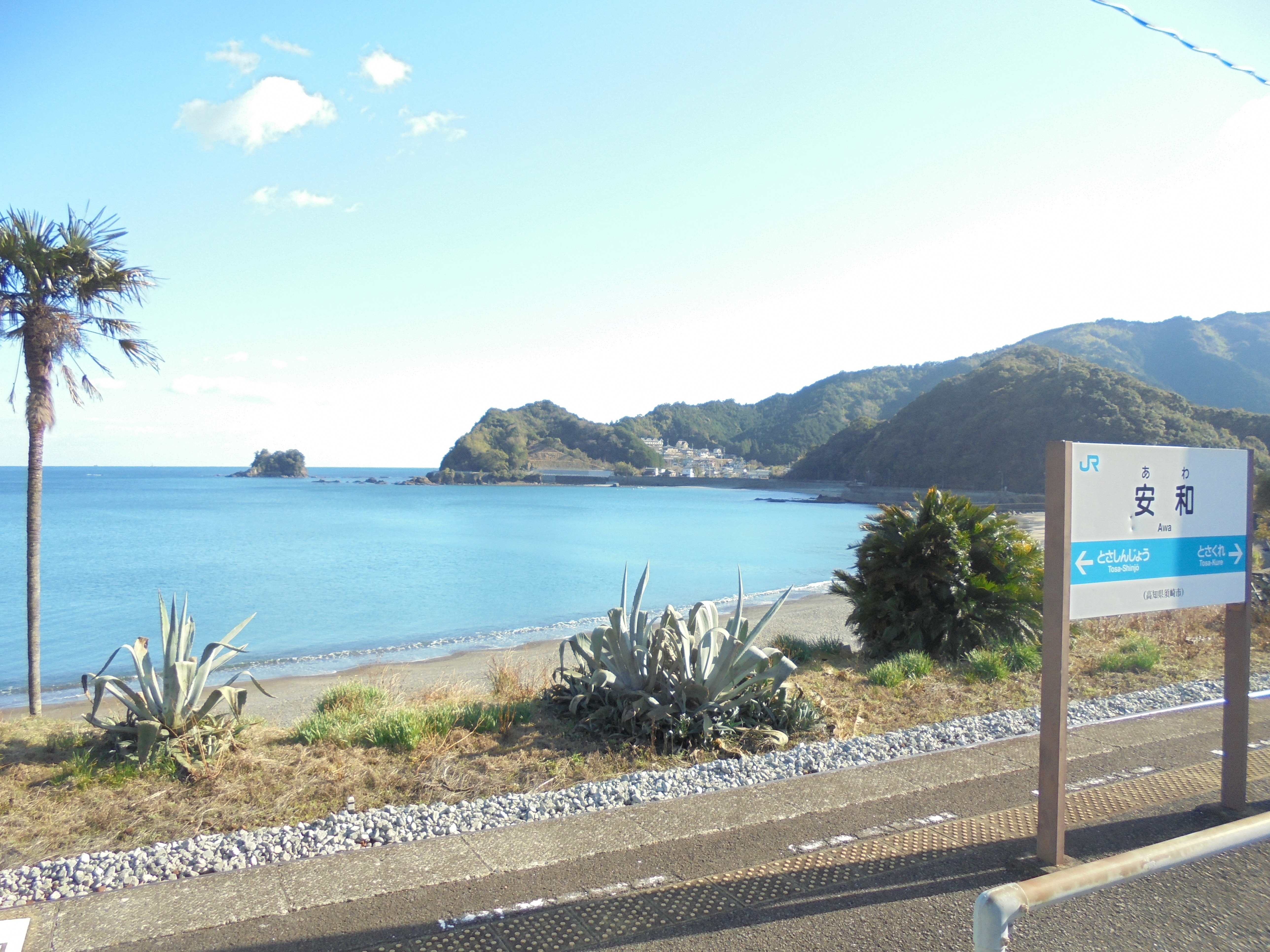 Vue de la station Awa